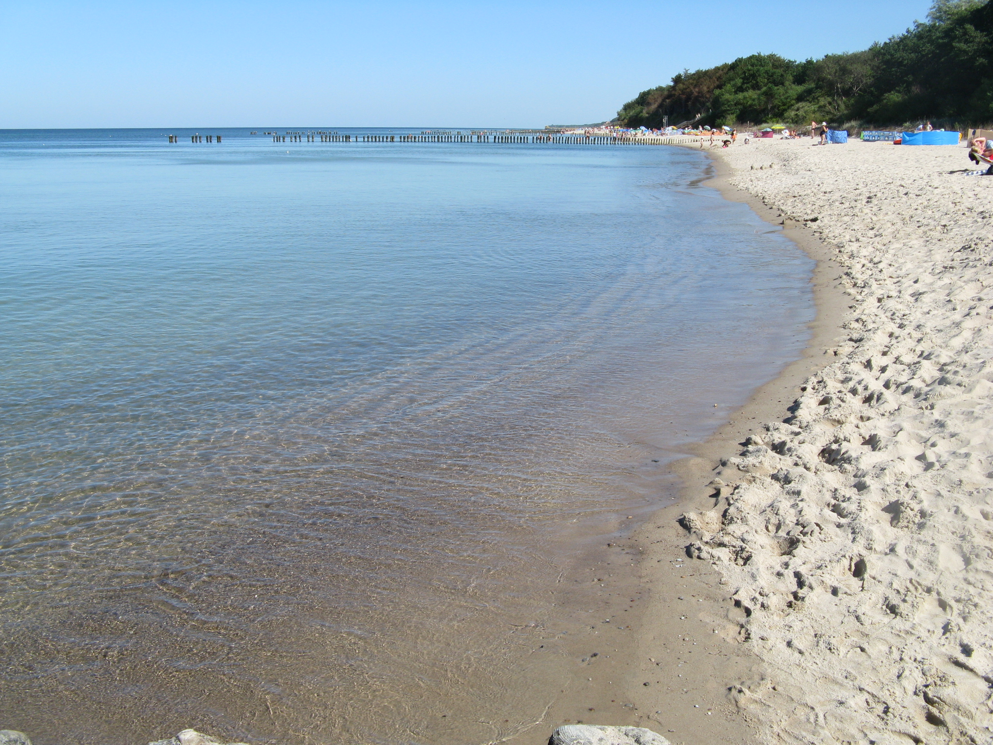 Sianożęty spokojne morze Bałtyckie